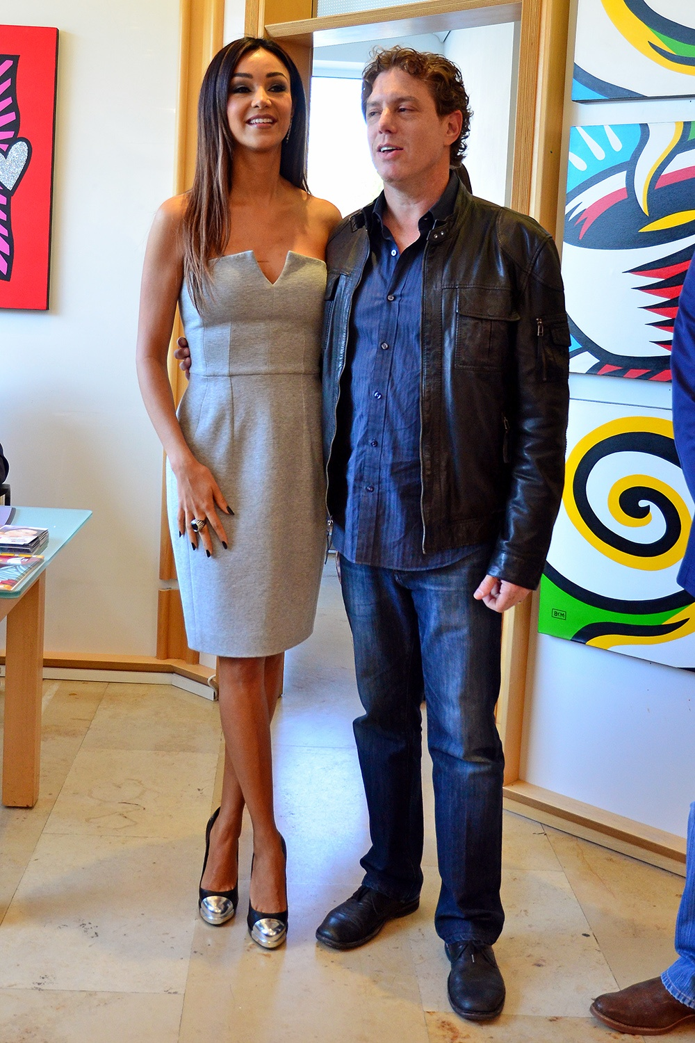 Burton Morris, Pop-Art Explosions, Galerie Mensing, Hamm, Datum/Uhrzeit: 28.04.2013 13:00:46